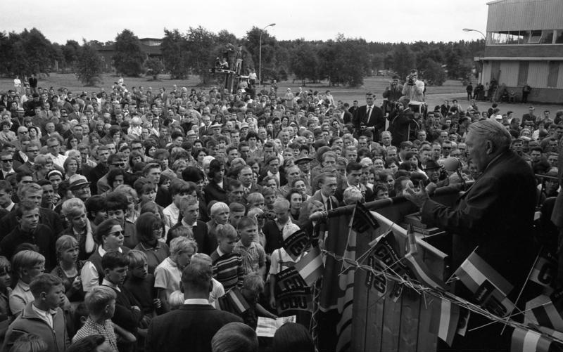 11.8.1965 Bundeskanzler Ludwig Erhard auf Wahlreise Neumünster-Lübeck